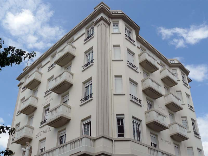 La façade de la Maison du Missionnaire, vue actuelle depuis la rue Mounin à Vichy.